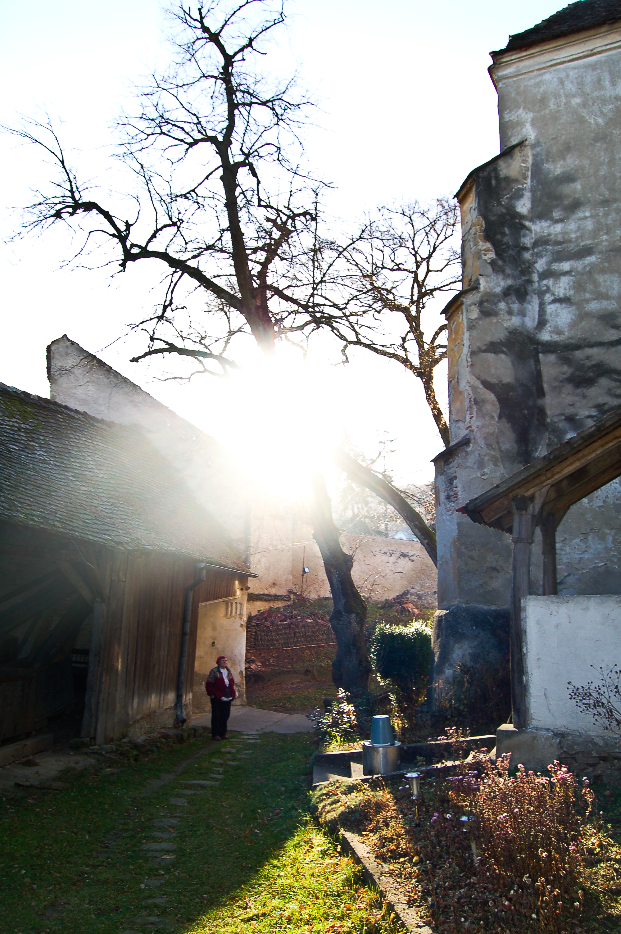 vedere a bisericii din curte saros pe tarnave 01